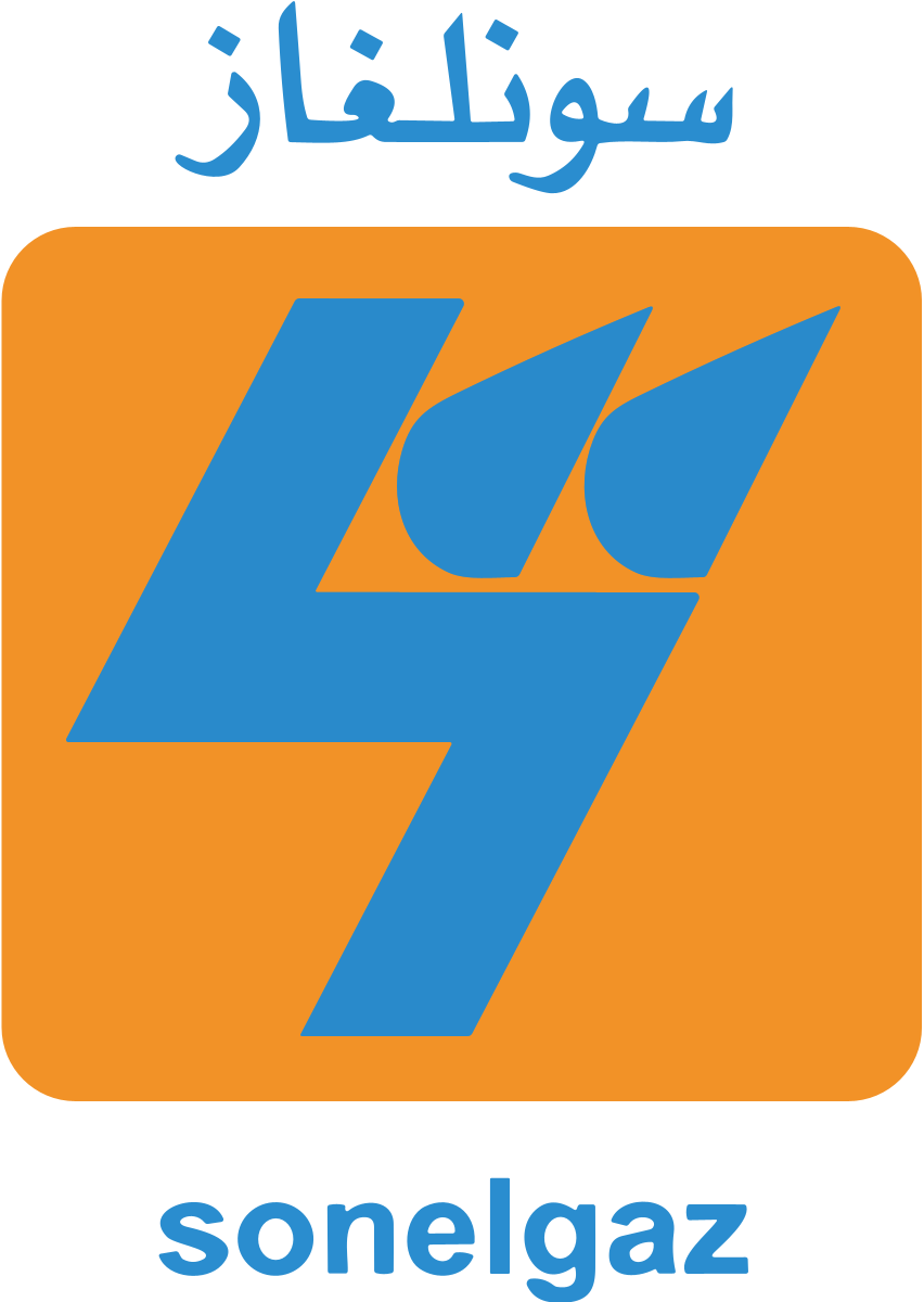 Logo de Sonelgaz, principal sponsor du club.